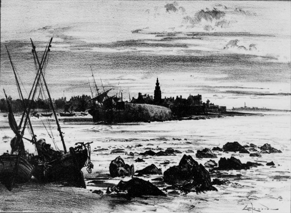 Roscoff vers 1900 (lithographie d'Albert Robida publiée dans "La vieille France, Bretagne" vers 1900)